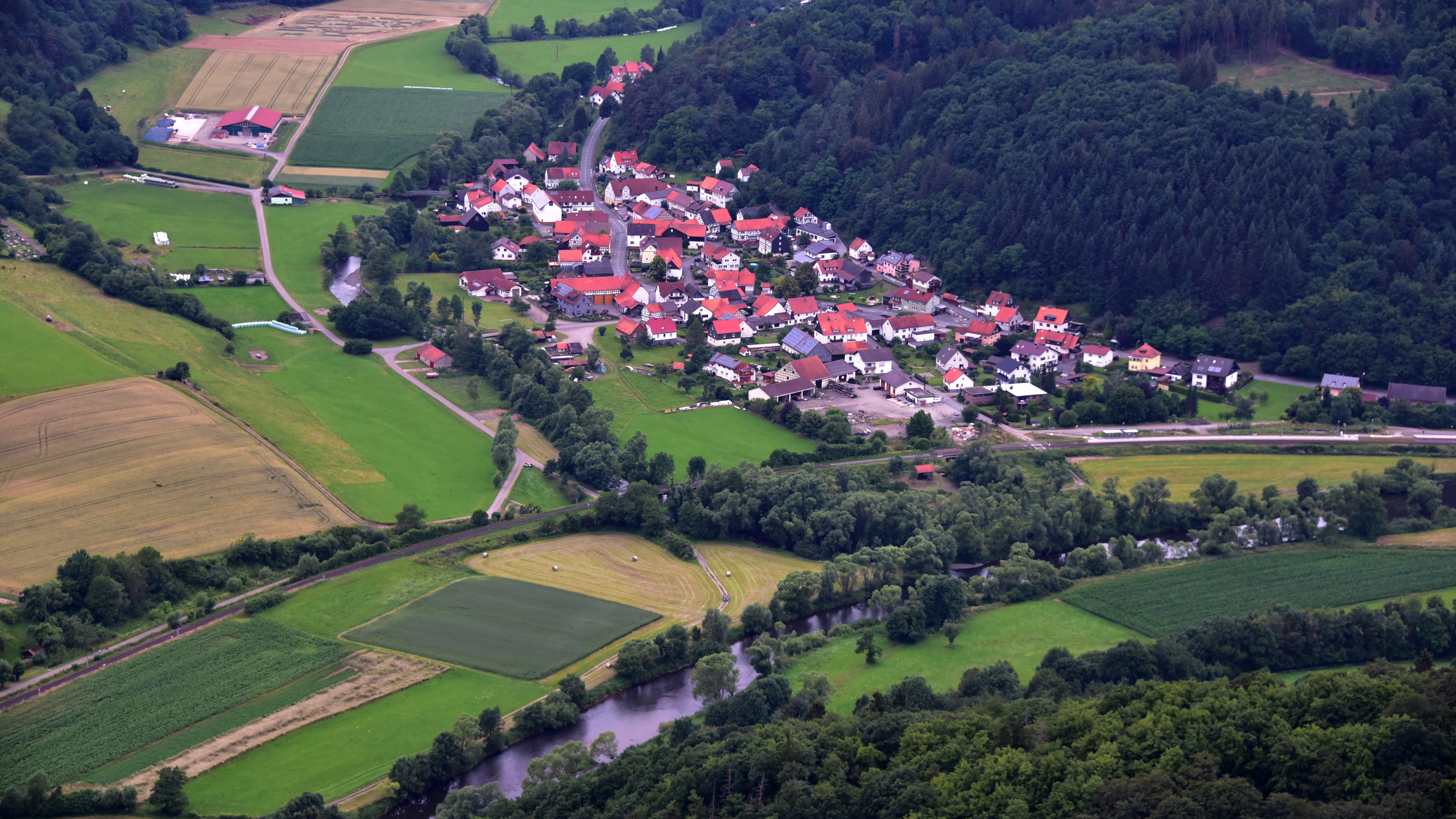 Ederbringhausen, Luftaufnahme (2016)